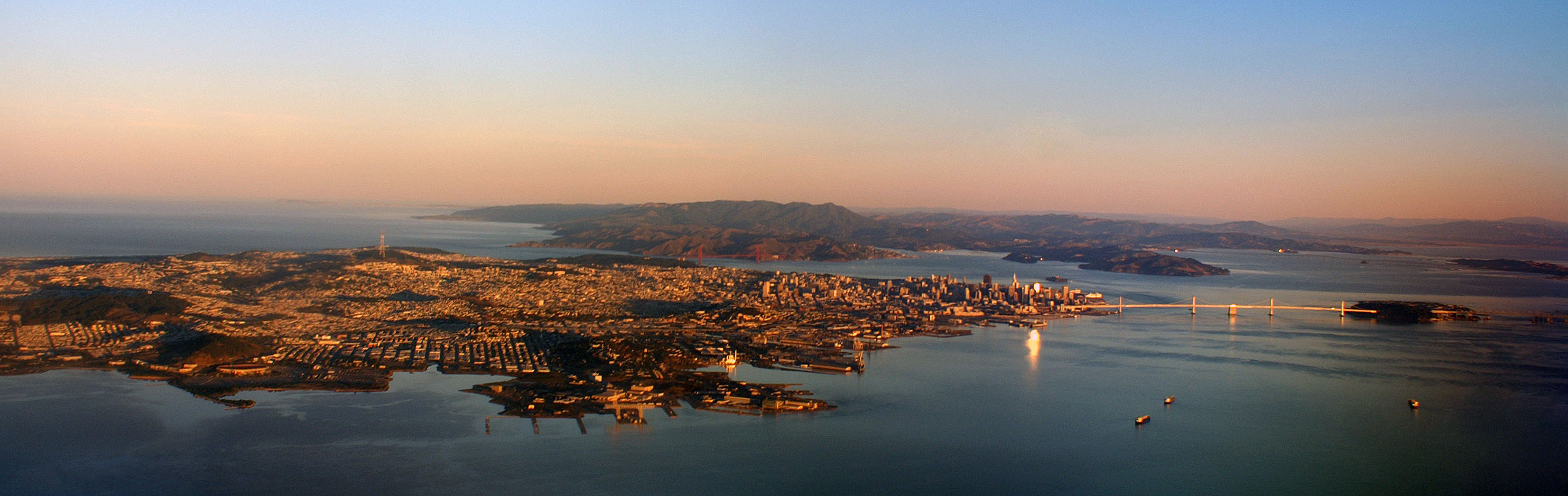 View of San Francisco, California as seen from 5,000 feet. Vista de la ciudad de San Francisco, California desde 5.000 pies de altura.